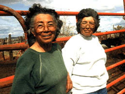 Mary (li.) und ihre Schwester Carrie Dann auf ihrer Ranch in Crescent Valley, Nev., 1992